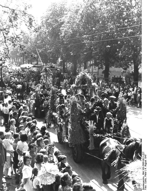 Ernte-fest in Berlin-Buchholz. Aufn.: Cürlis-Illus 4.8.47 732-47